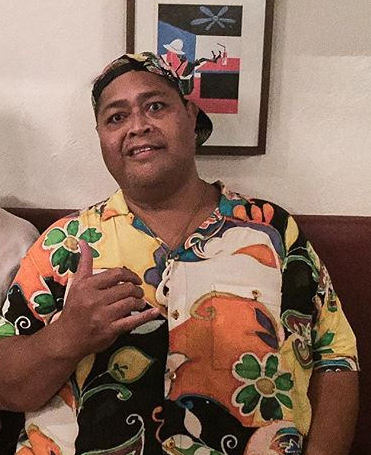 on Instagram ift.tt/1Mkv33J